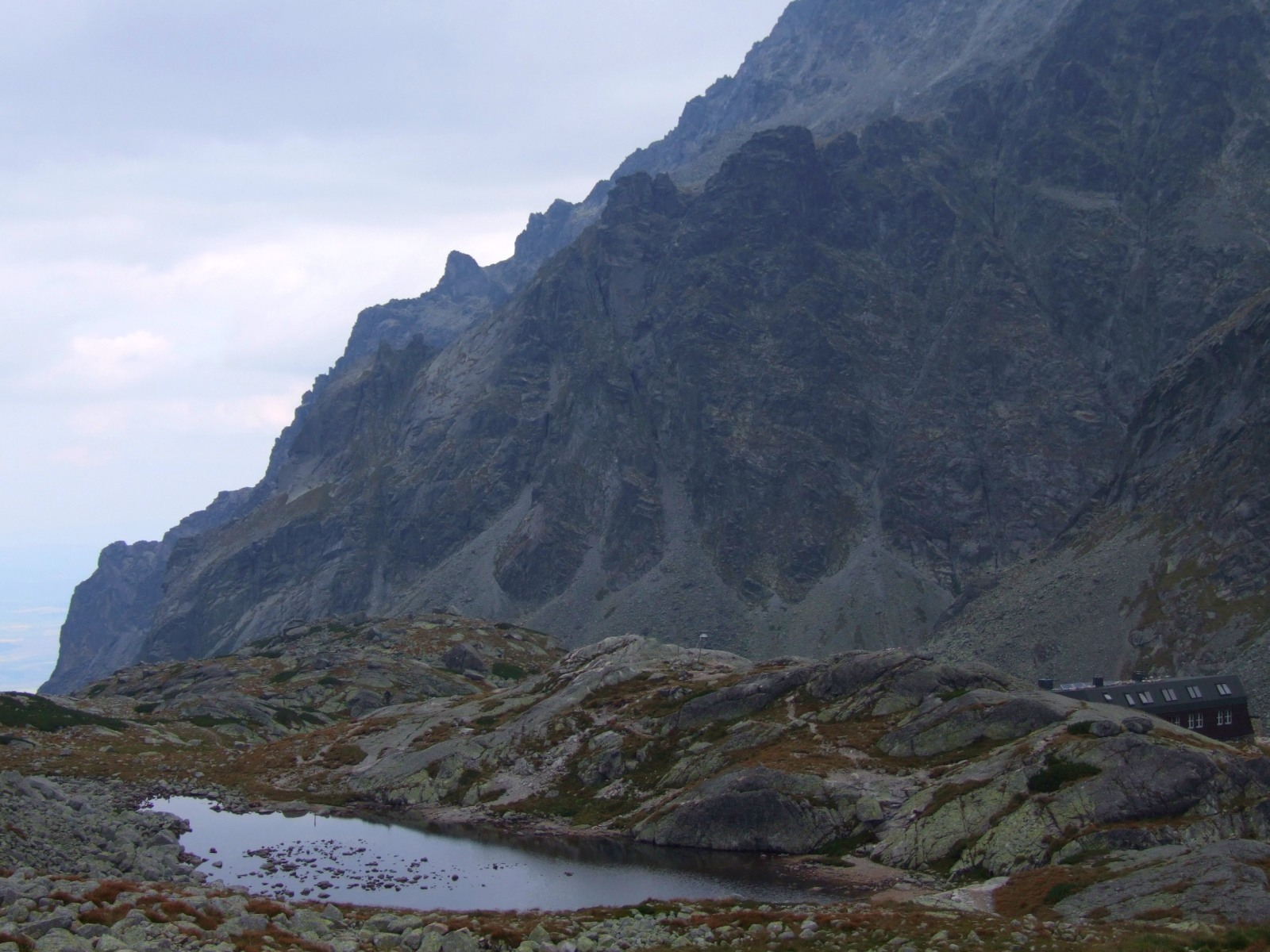 Niżni Harnaski Staw (słowackie Tatry Wysokie)